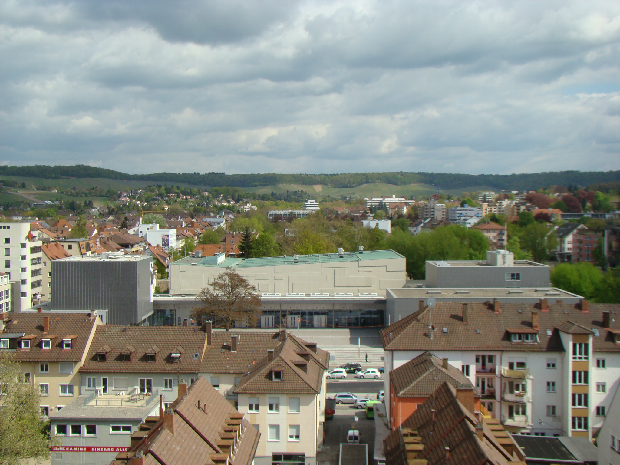 Festhalle Harmonie in Heilbronn, Blick vom Hafenmarktturm